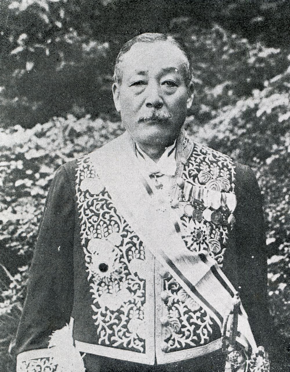 この写真は櫻内幸雄（1880-1947）の写真です。